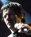 Alejandro Sokol